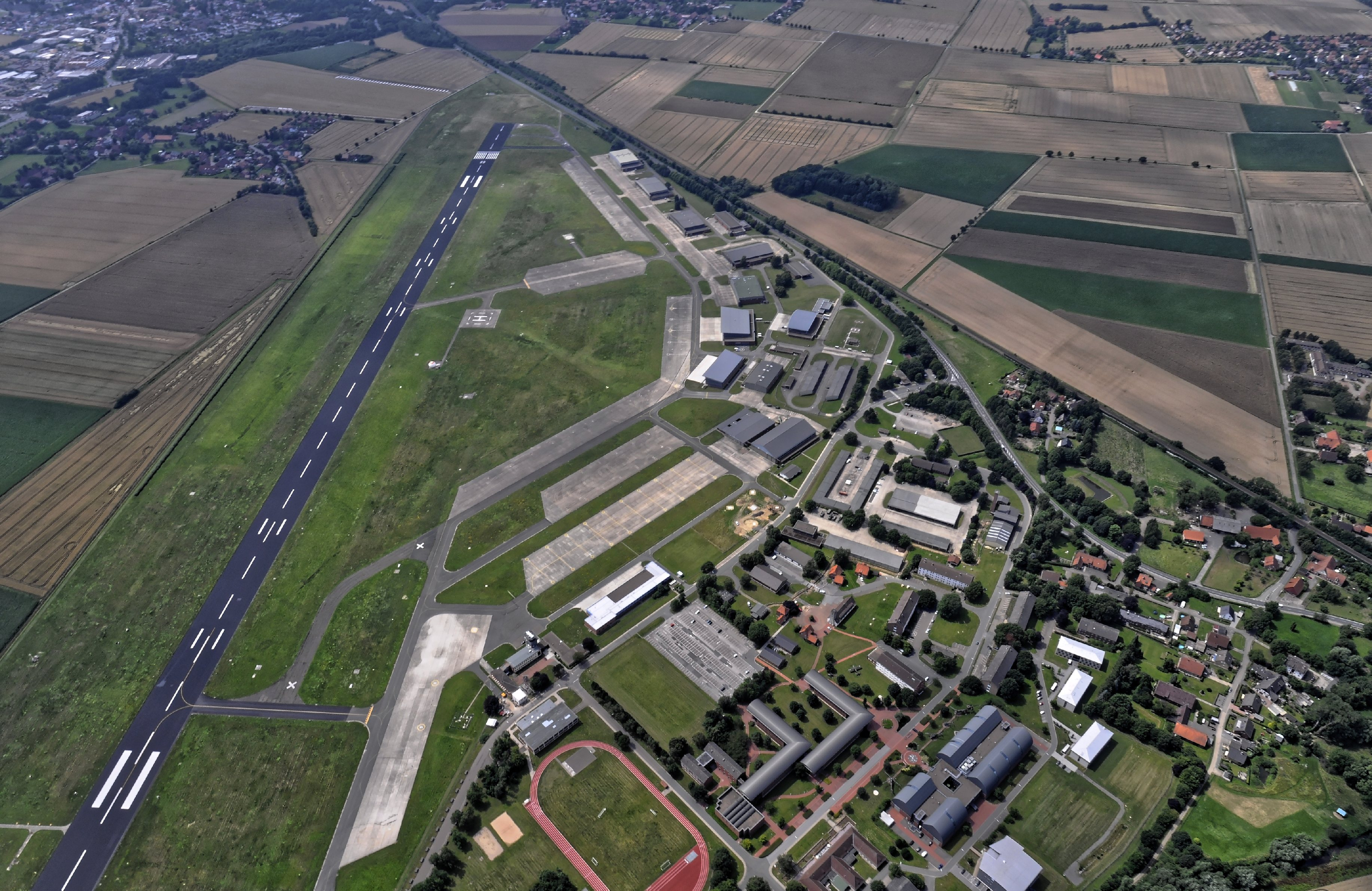 Bilder vom Flug Nordholz-Hammelburg 2015: Heeresflugplatz Bückeburg